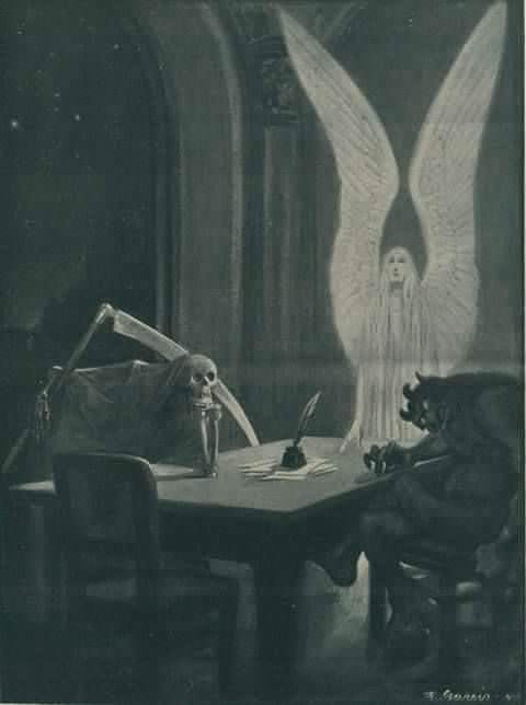 Fritz Gareis (1872-1925), ‘In Erwartung’ (In Anticipation), from Die Muskete, March 23, 1916